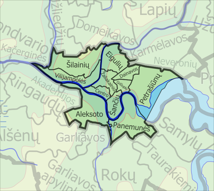 Padaryta iš lt::image:LietuvosSeniunijos.png.